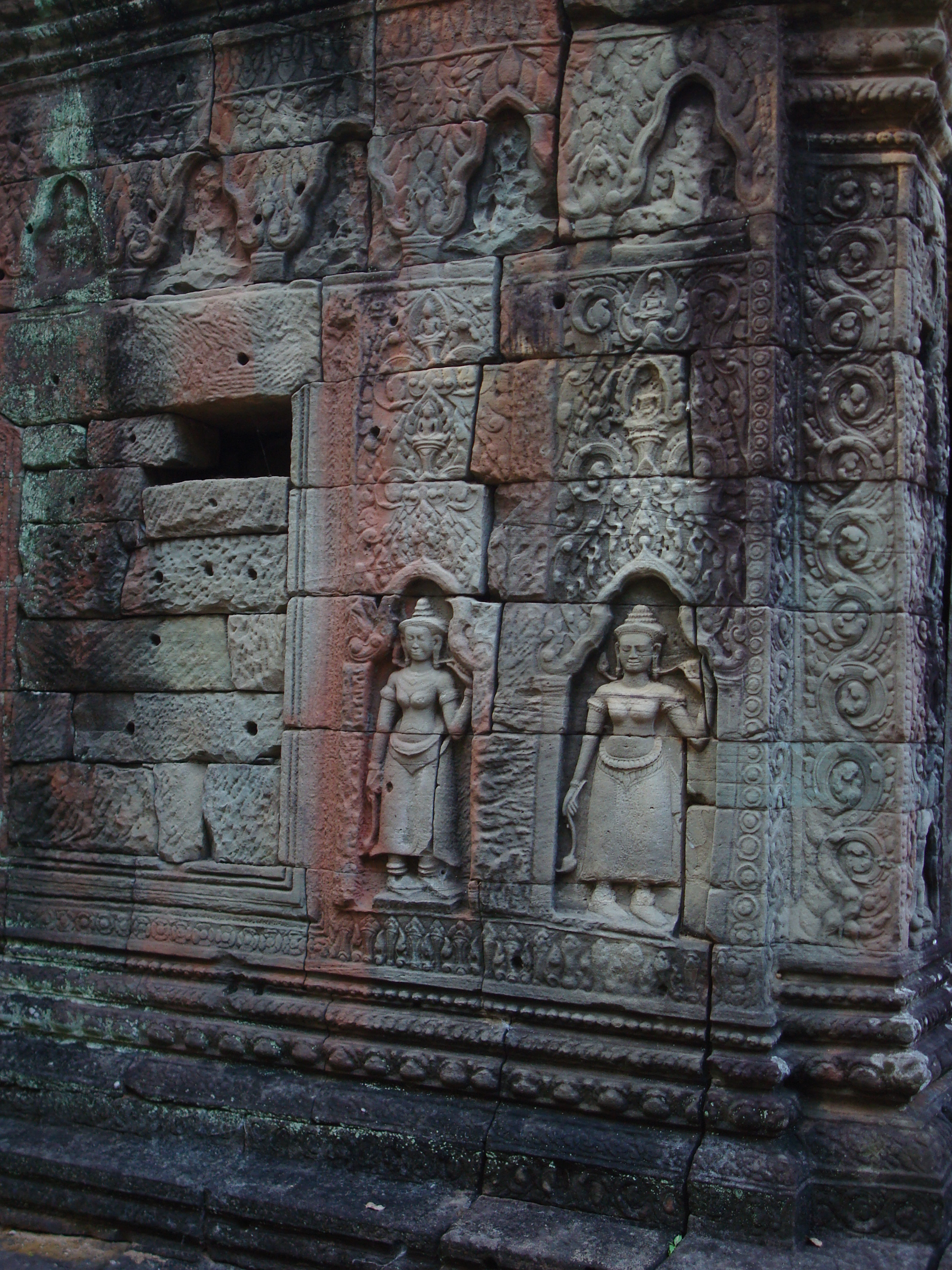 Devatas am Prasat von Krol Ko